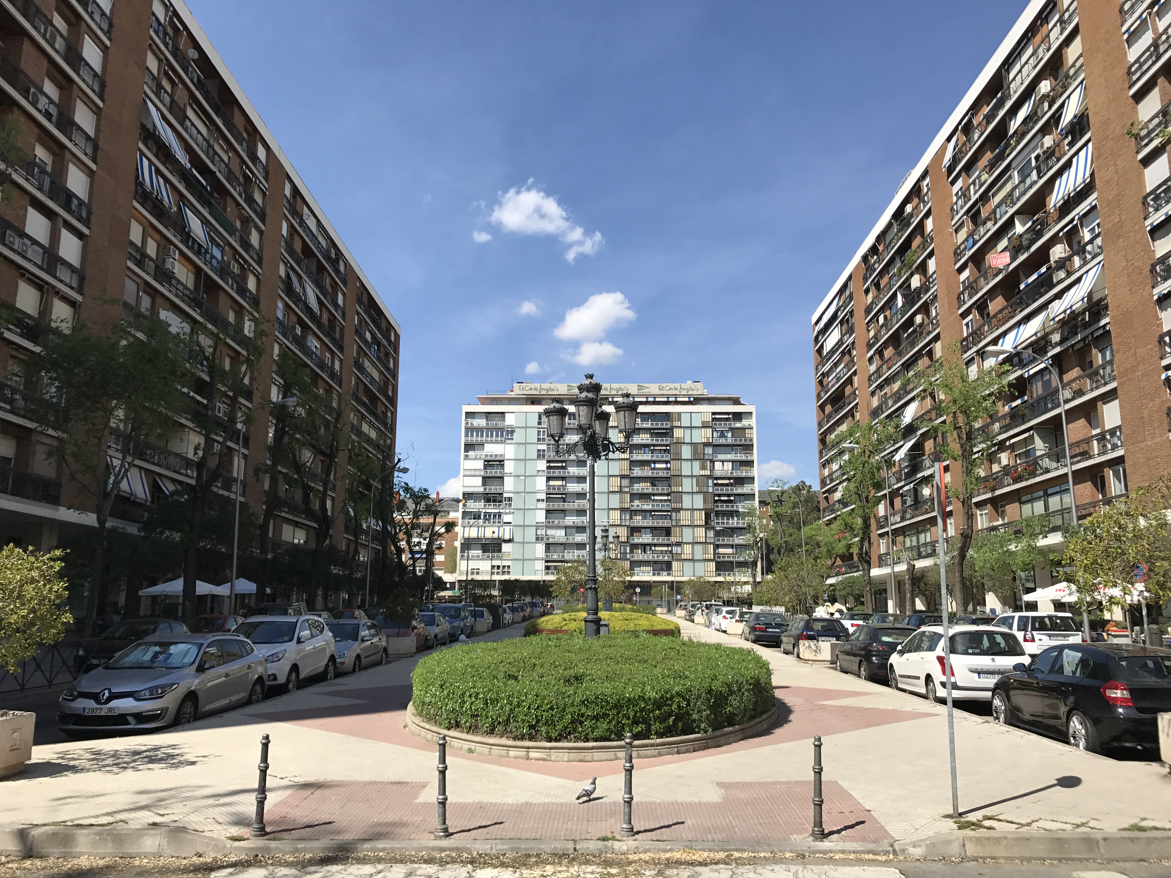 Plaza del Conde del Valle de Suchil, Madrid.